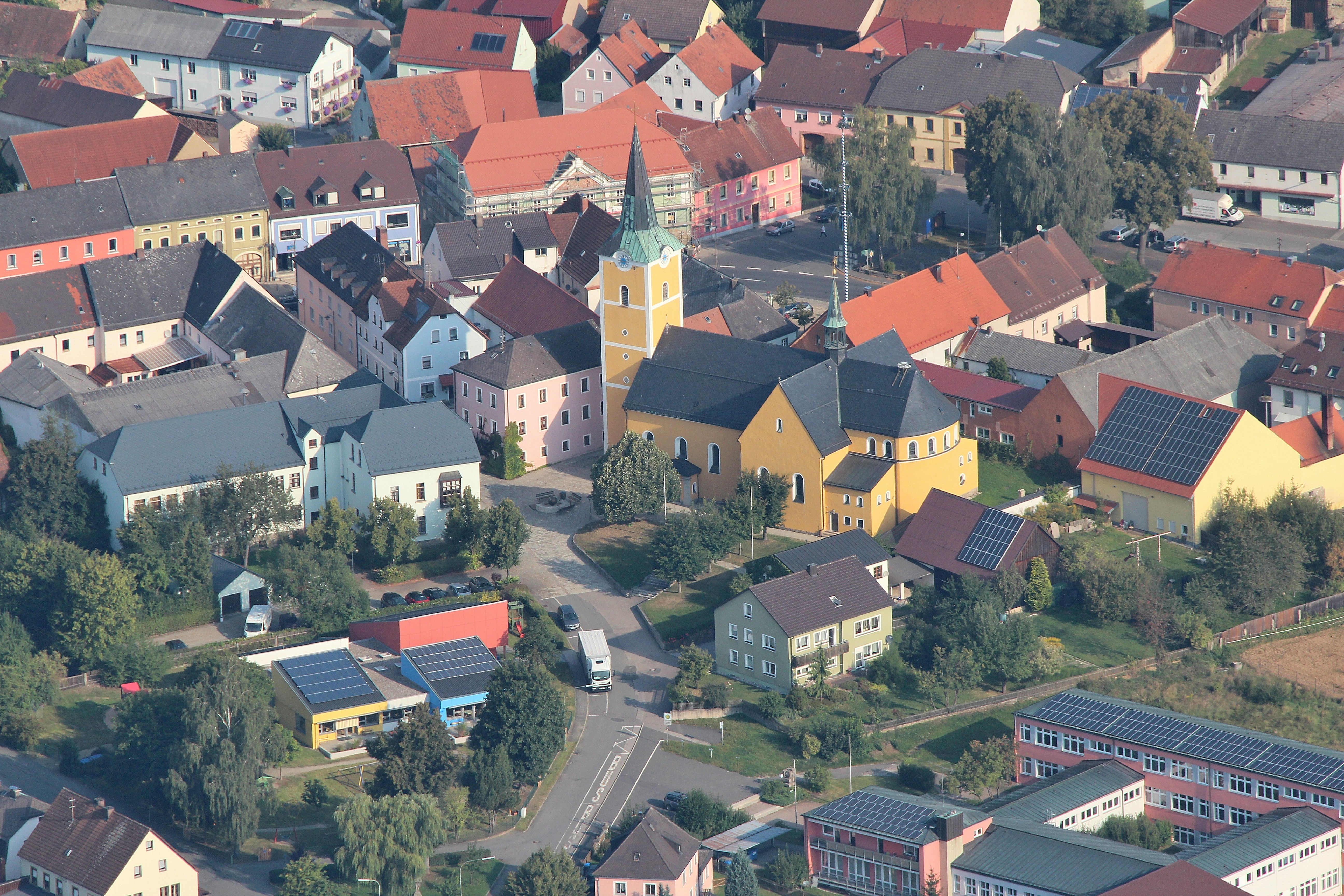 Waidhaus, Pfarrkirche St. Emmeram; Landkreis Neustadt an der Waldnaab, Oberpfalz, Bayern